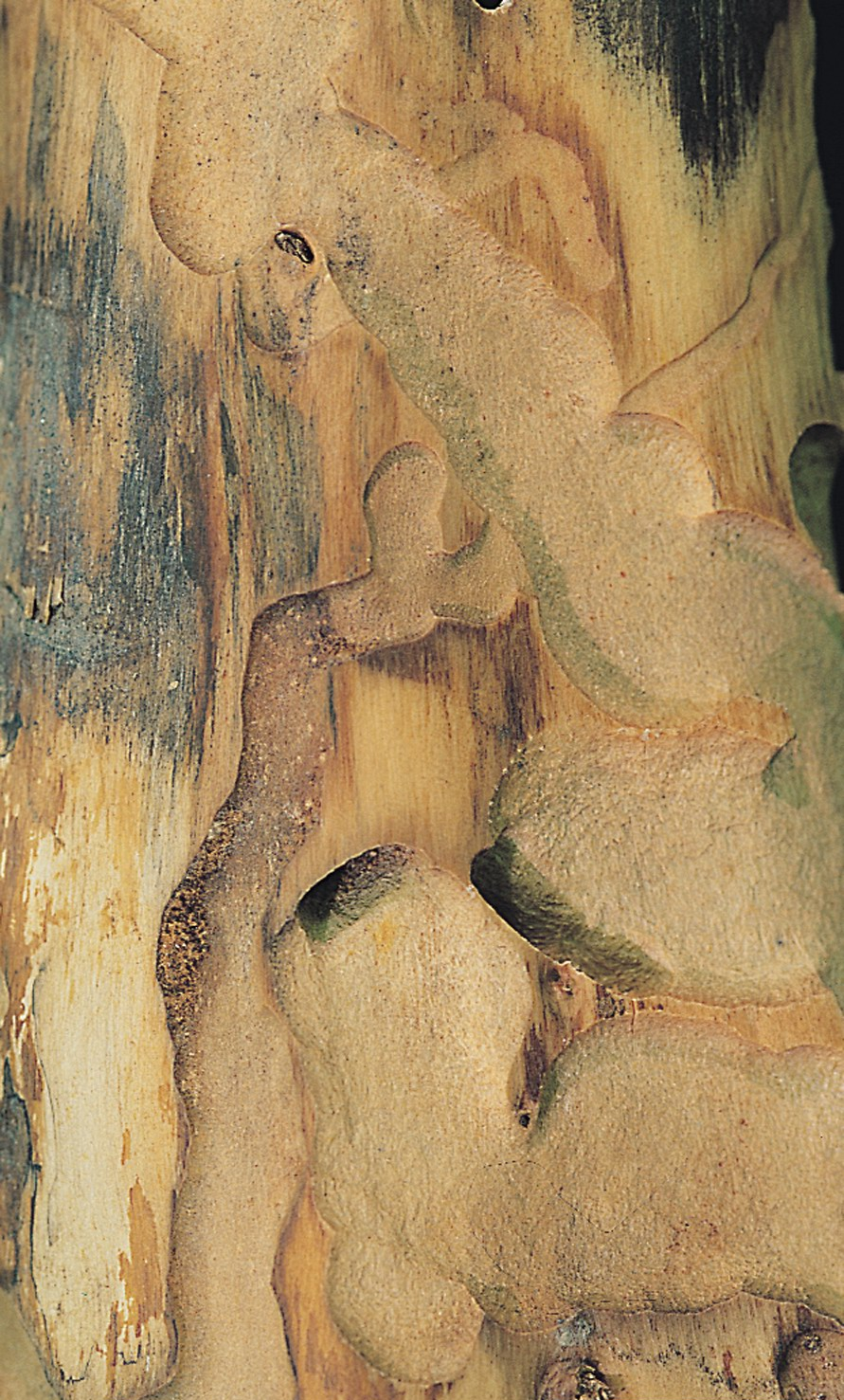 Callidium violaceum Bohrgänge unter der Rinde